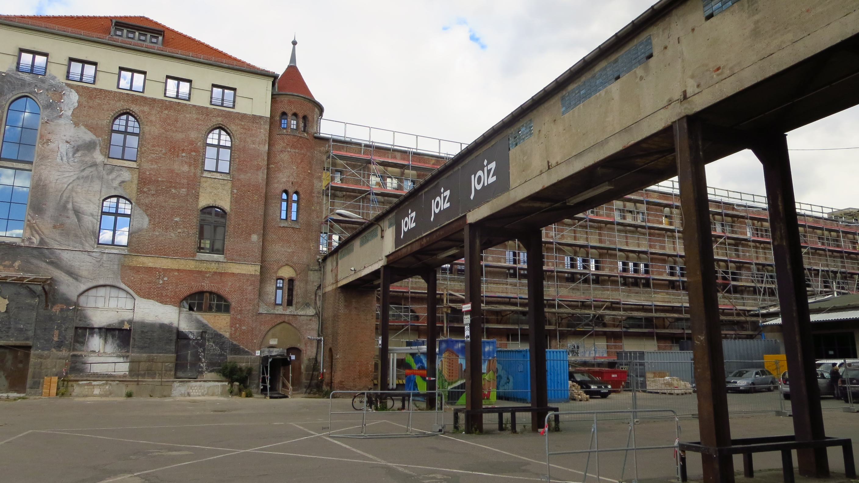 Postamt O 17, Nordseite